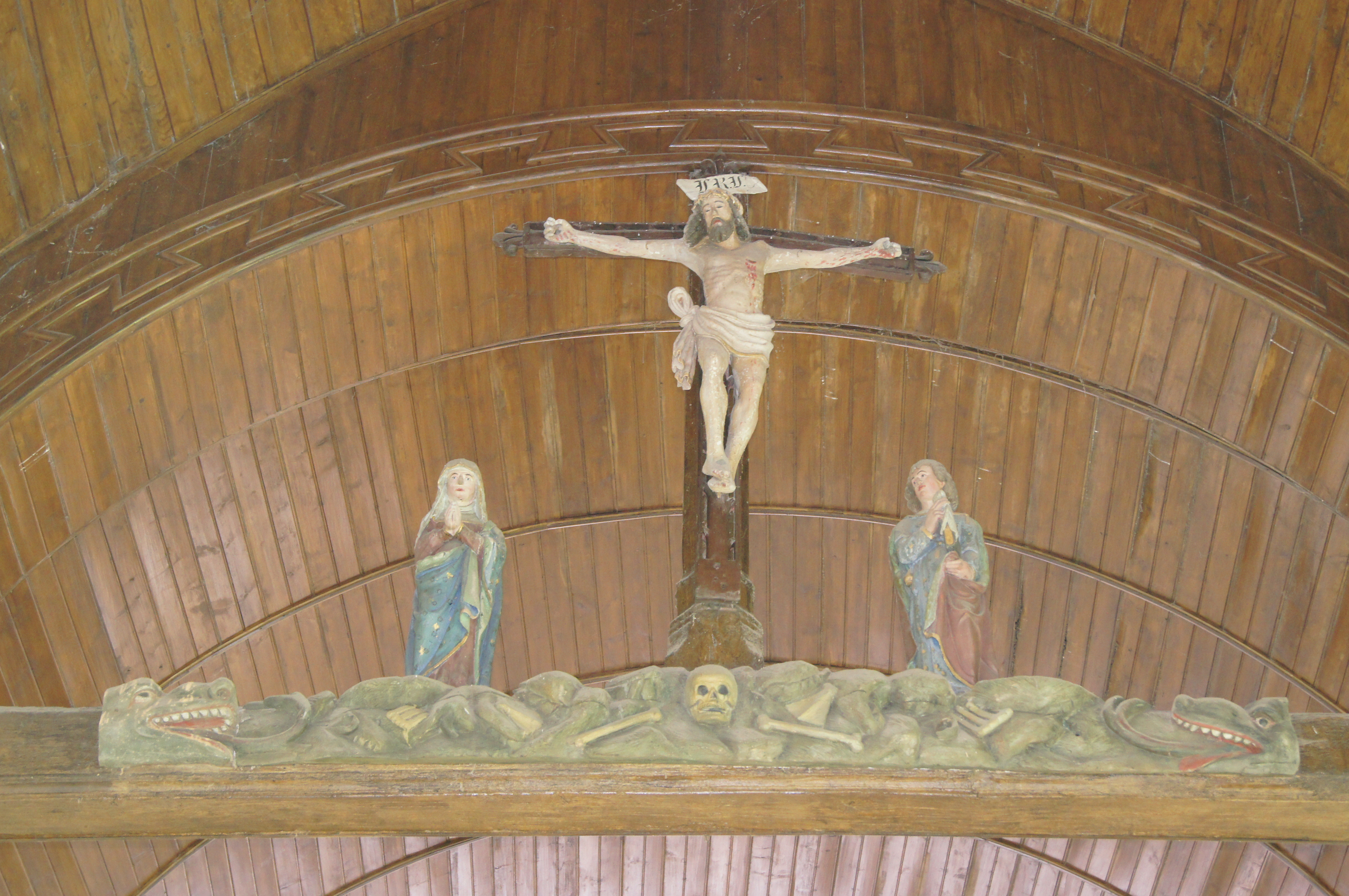 Arc triomphal Saint-Germain d'Ecosse Eglise Saint-Germain de Saint-Germain-sur-Bresle